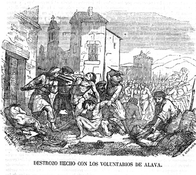 Fusilamientos de Heredia. Grabado en madera del libro: Panorama Español. Página 41. Tomo II. Madrid 1842.